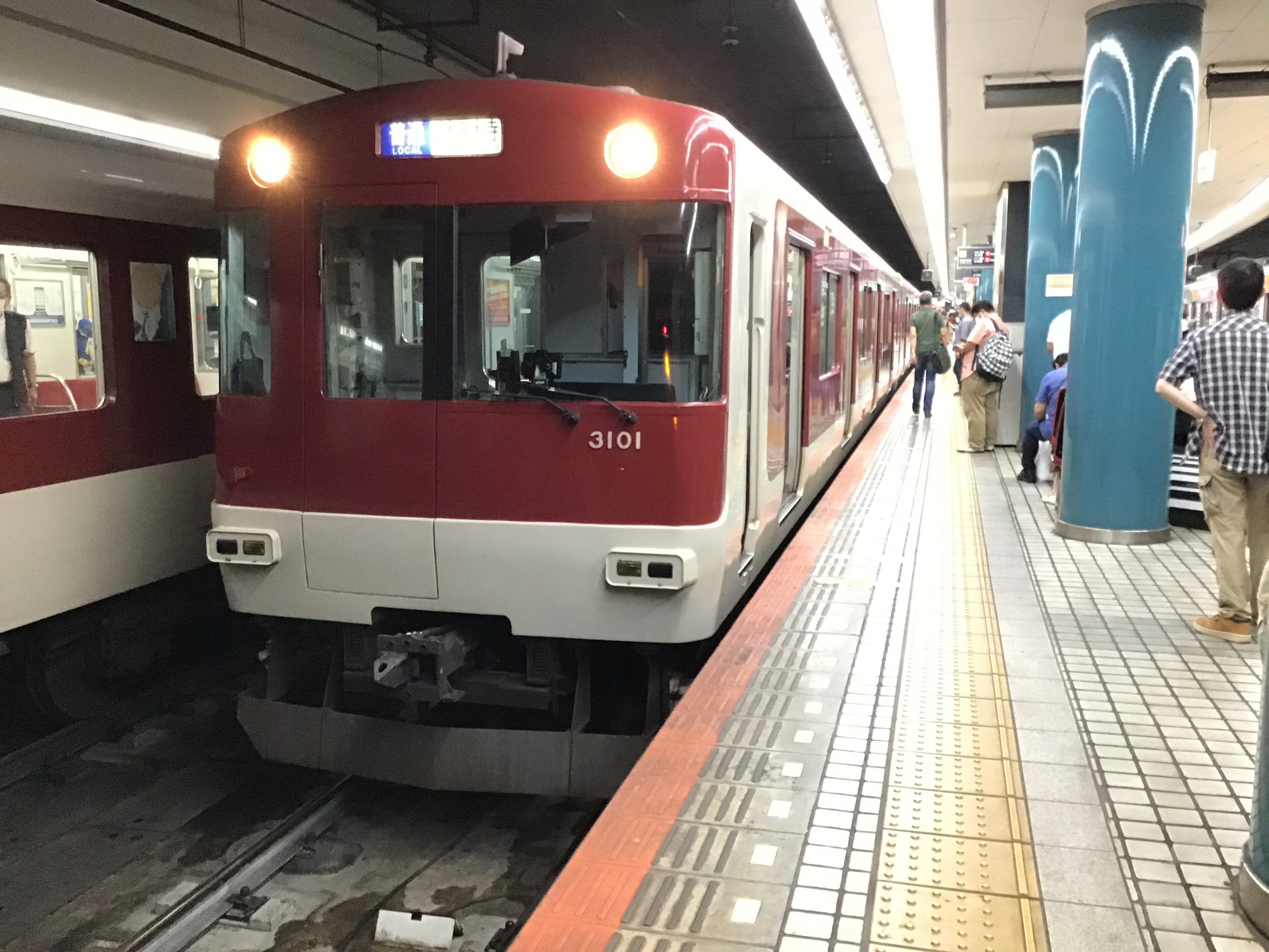 近鉄奈良線・大和西大寺行きの3200系3201F。大阪難波駅の2番ホームに停車中。